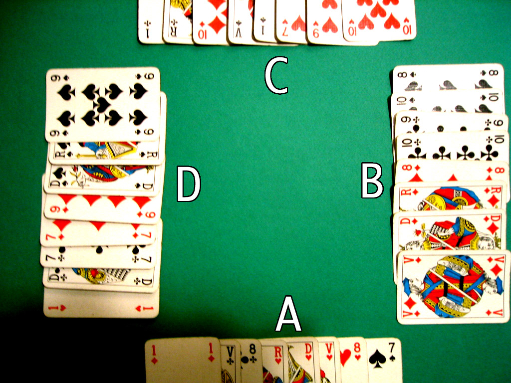 belote cartes